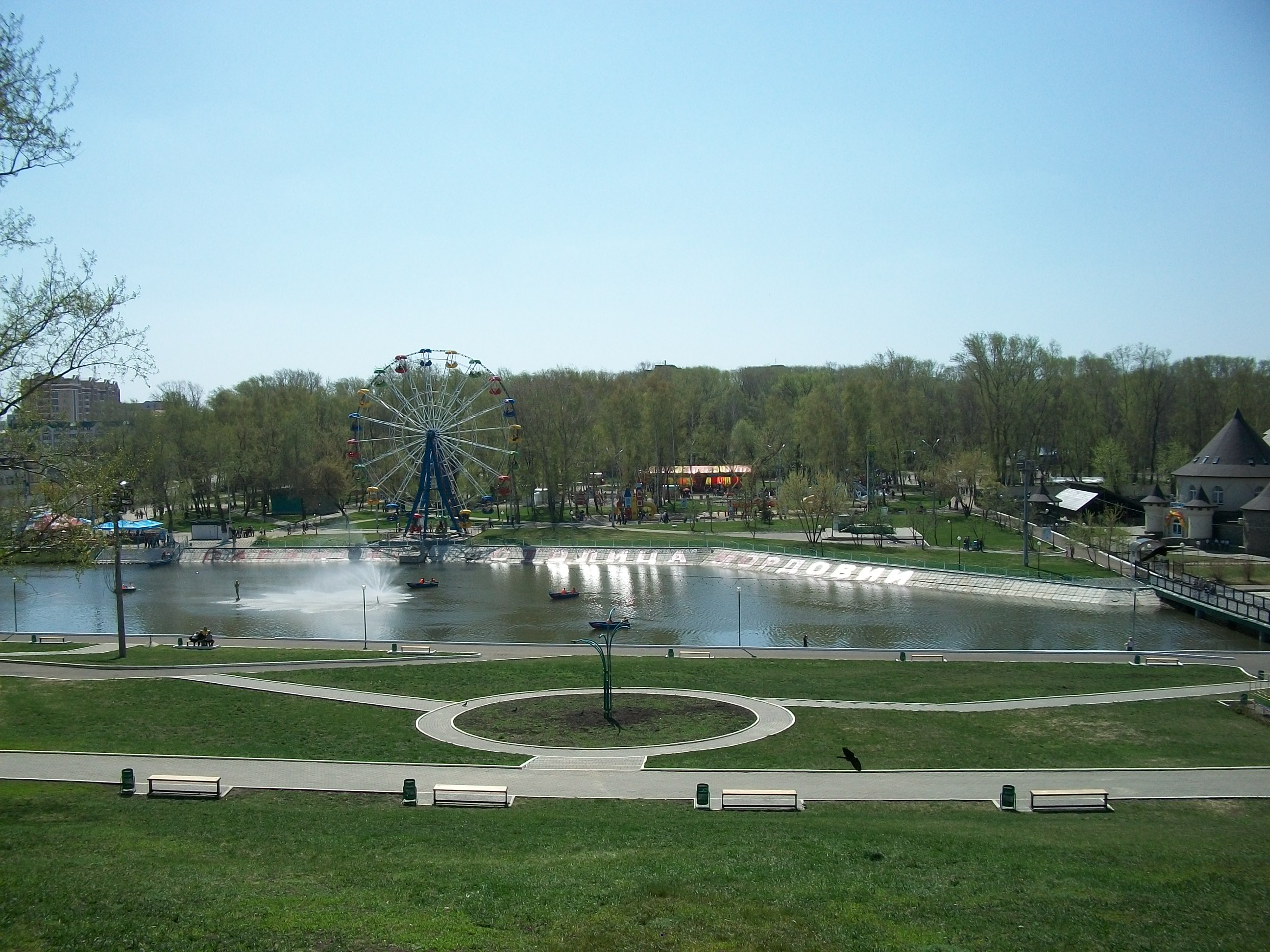 Вид на парк имени А. С. Пушкина (город Саранск, Мордовия)